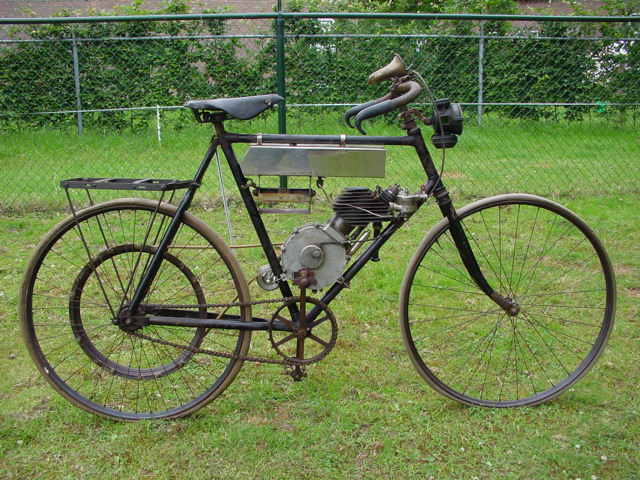 Toestemming van Yesterdays Antique Motorcycles (